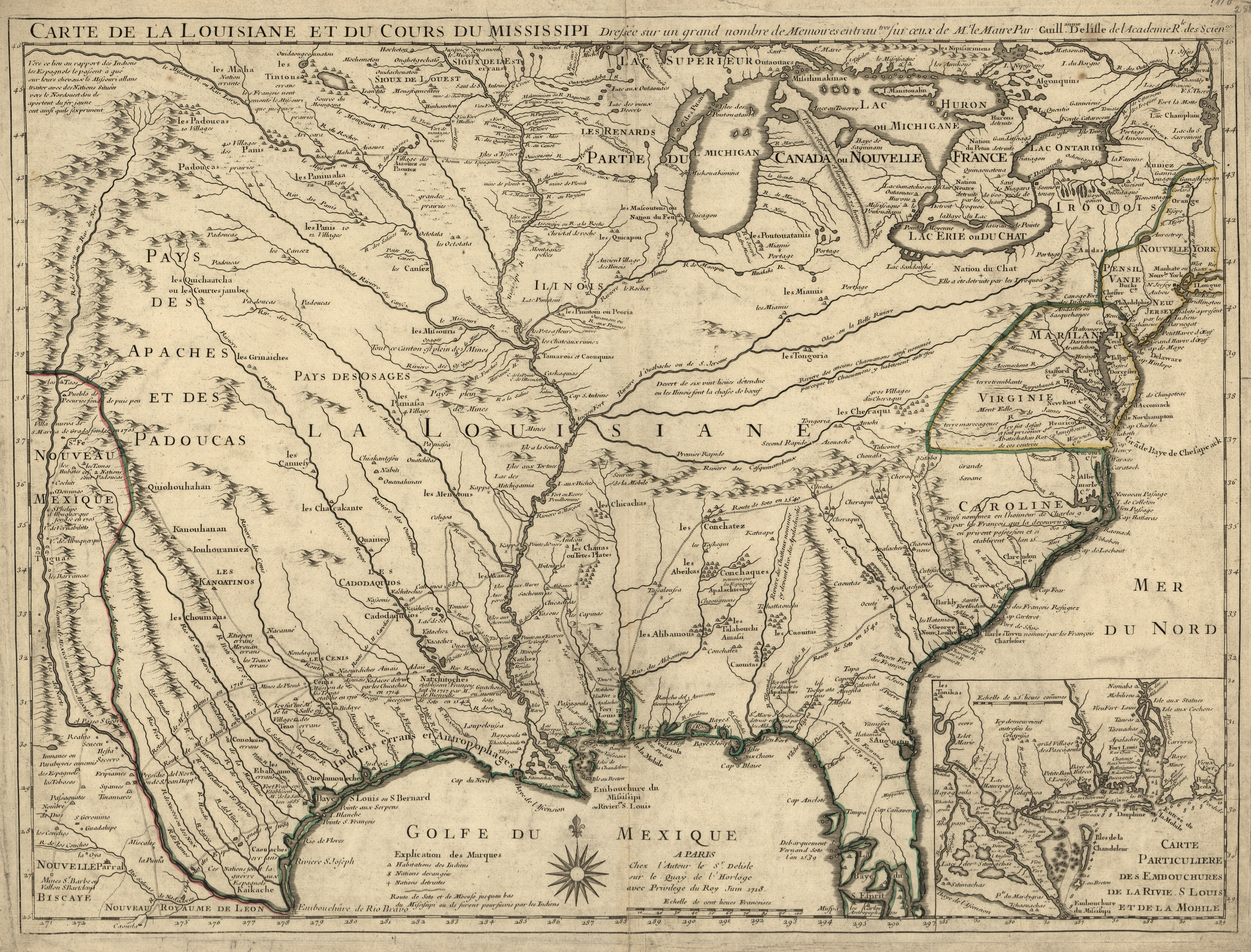 Carte de la Louisiane et du cours du Mississipi [i.e. Mississippi]: dressée sur un grand nombre de mémoires entrautres sur ceux de Mr. le Maire